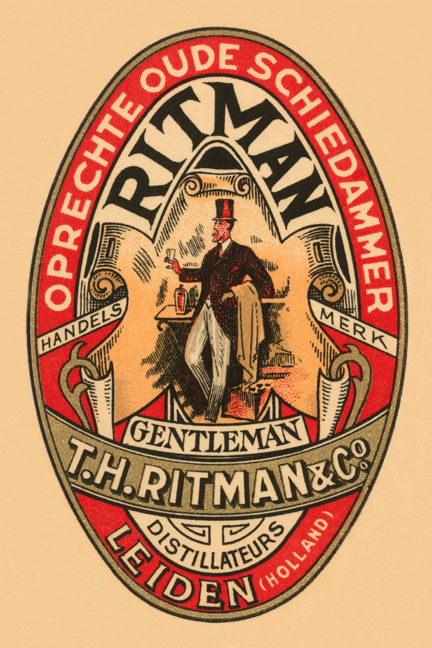 Etiket: Oprechte Oude Schiedammer; Ritman; handelsmerk Gentleman; T.H. Ritman & Co.